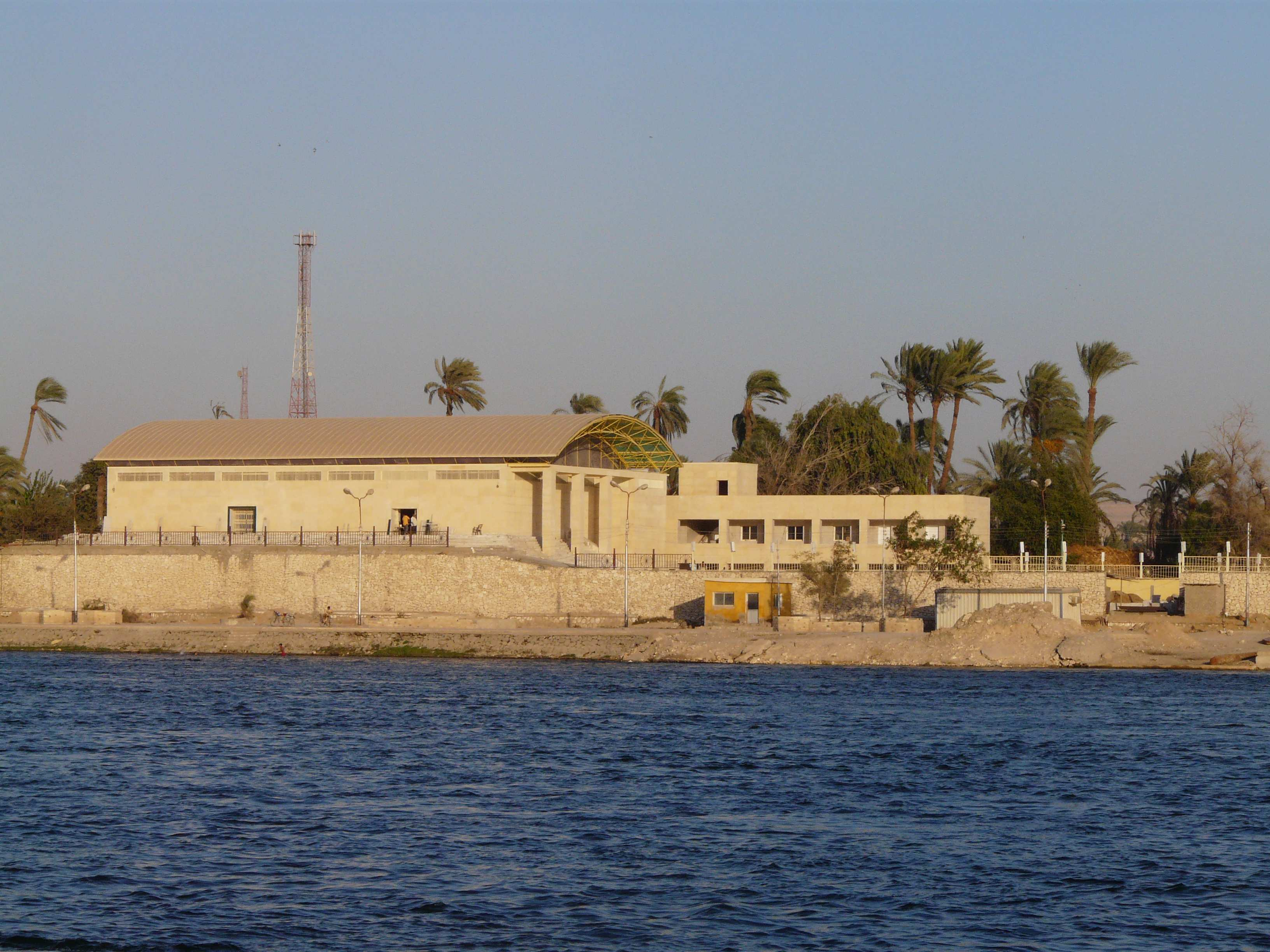 Accès au site d'Amarna par le bac - Vue sur le musée en construction